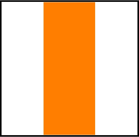 סימון שבילים בישראל